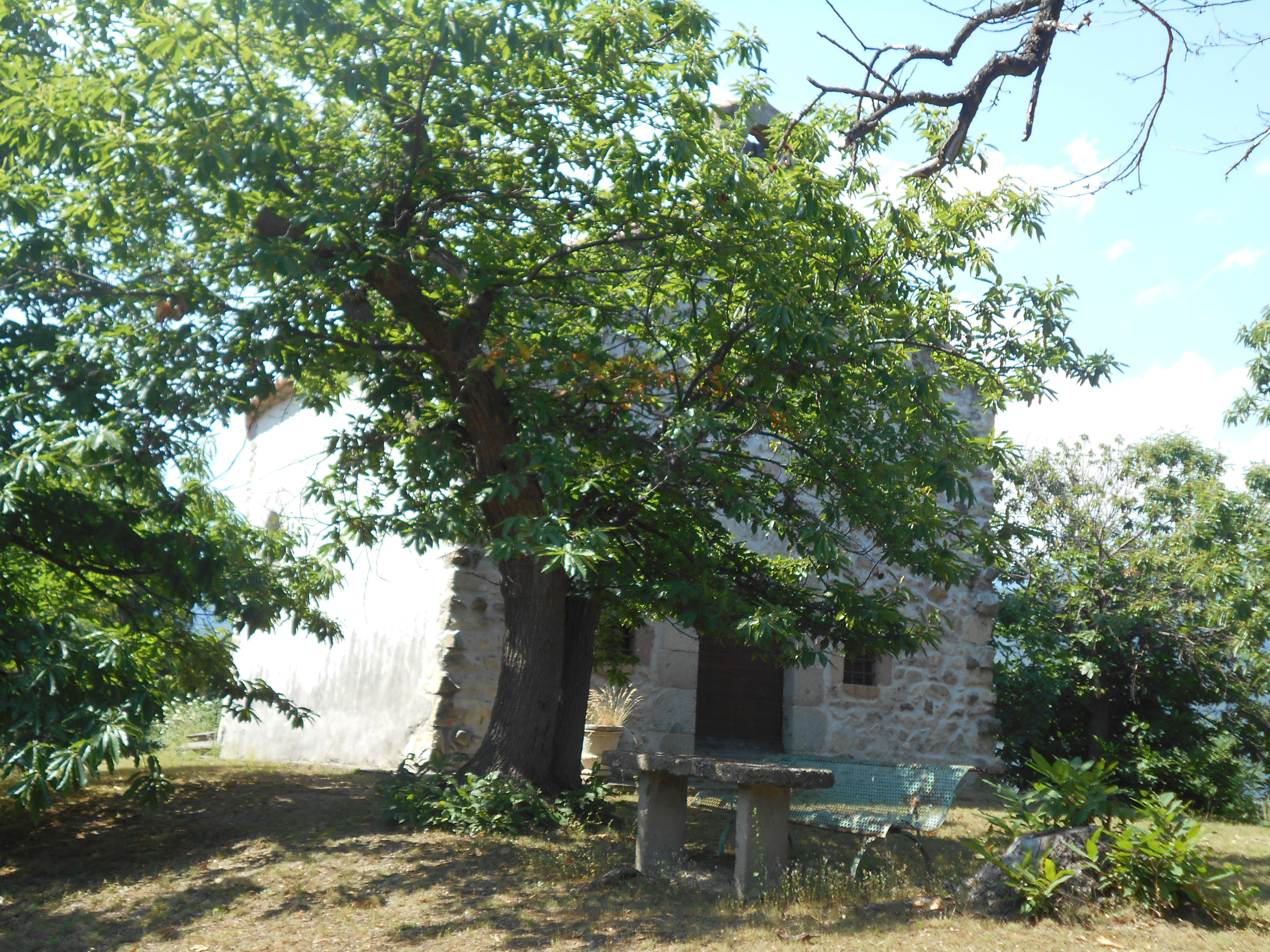 Sant Antoni de Pàdua de Can Mas, a Serrallonga. Vista des de la carretera